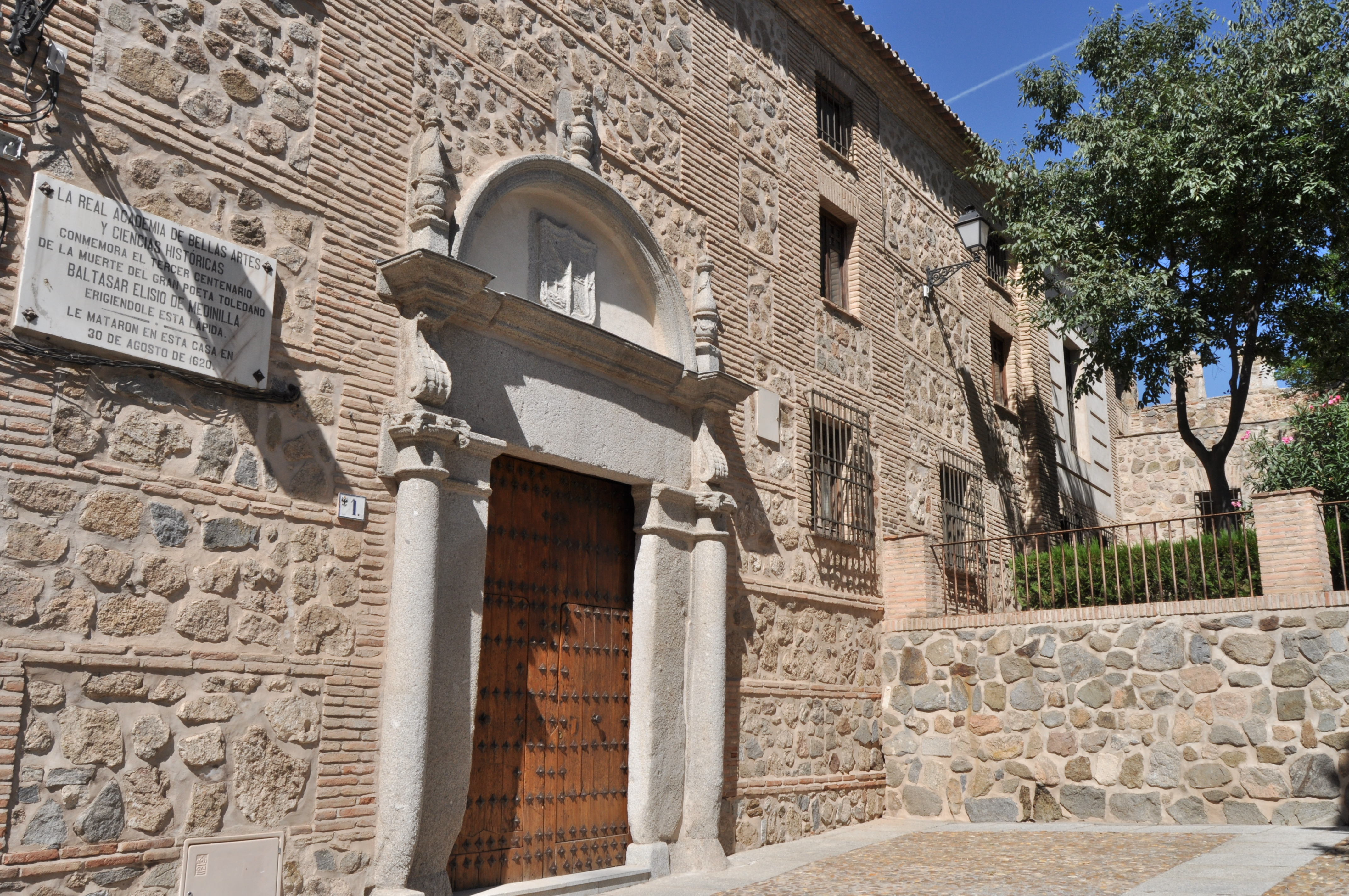 Toledo Capital - 165